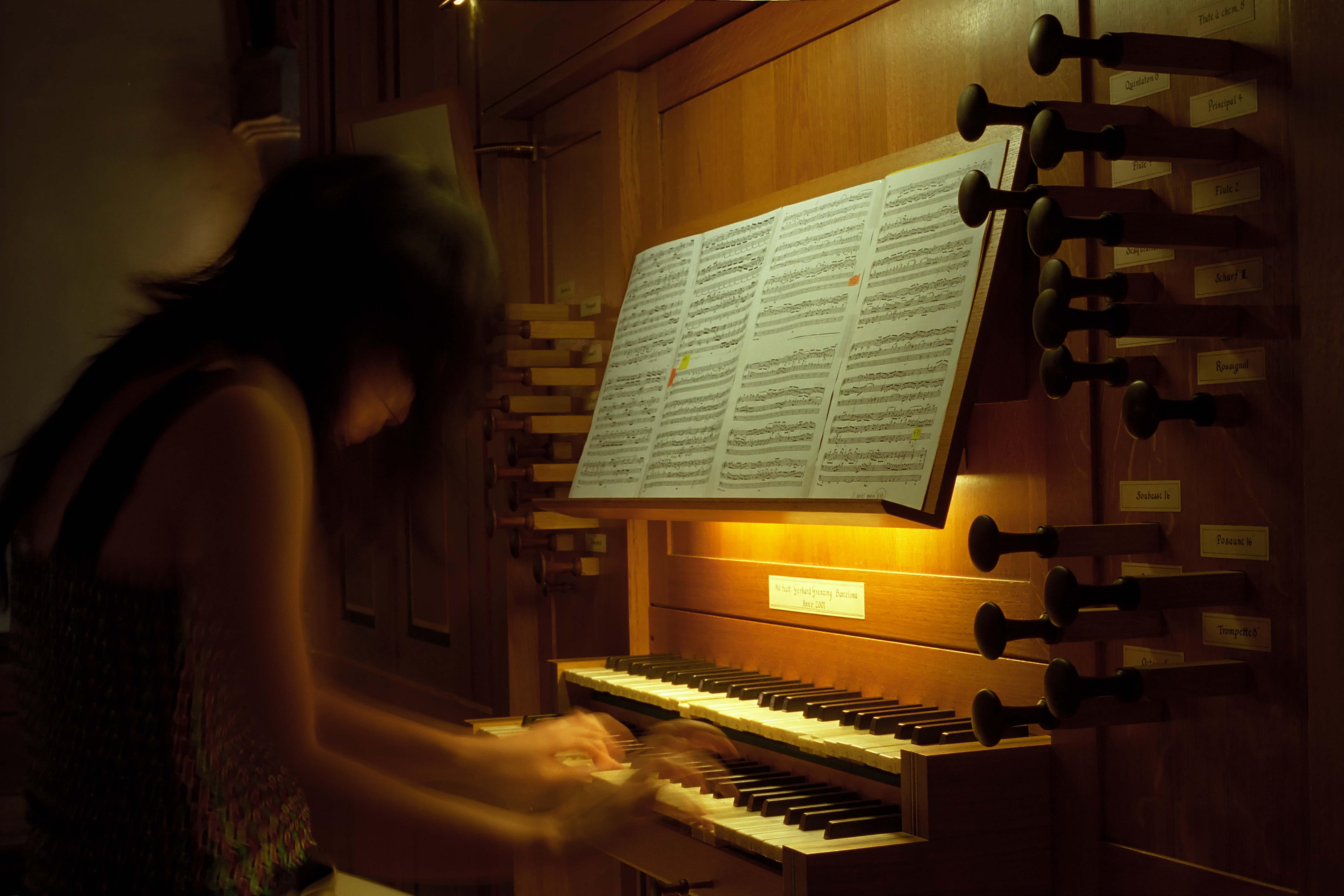 Organist, Geneva, Switzerland organ stop list: Grand Orgue Bourdon 16 Principal 8 Bourdon 8 Gambe 8 Octave 4 Flûte 4 Quinte ou Nasard 2 2/3 Octave 2 Tierce 1 3/5 Mixture V Cornet V Trompette 8 Positif Flûte à cheminée 8 Quintaton 8 Principal 4 Flûte 4 Flûte 2 Sesquialtera II Scharff III Vox humana 8 Tremblant Ped Soubasse 16 Octave 8 Octave 4 Posaune 16 Trompette 8 Tirasses, en tout cas HW/Ped Accouplement OW/HW